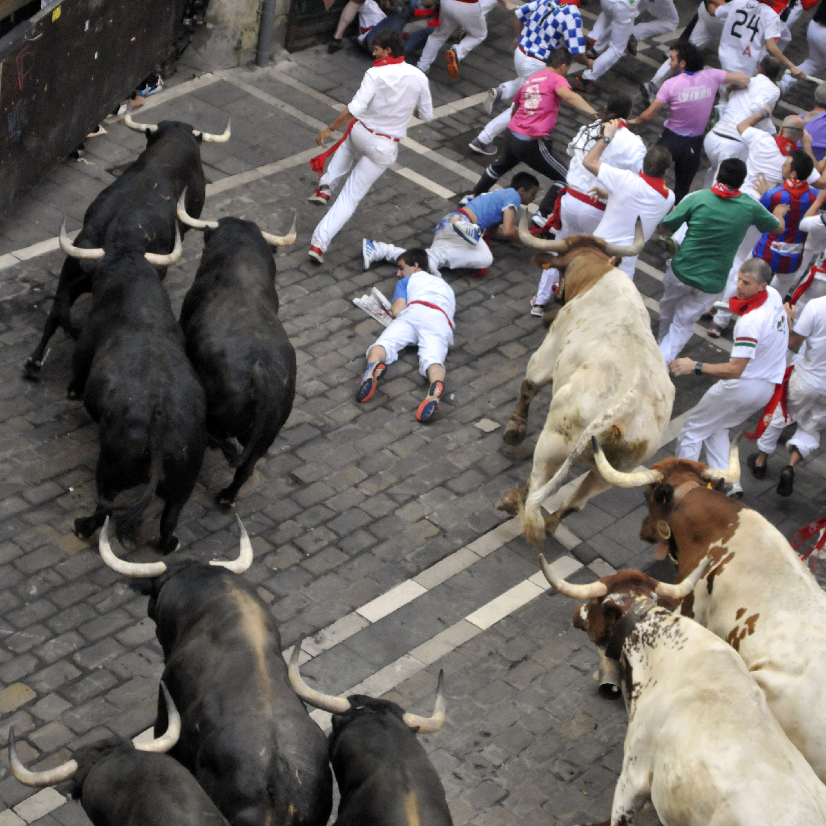 curva